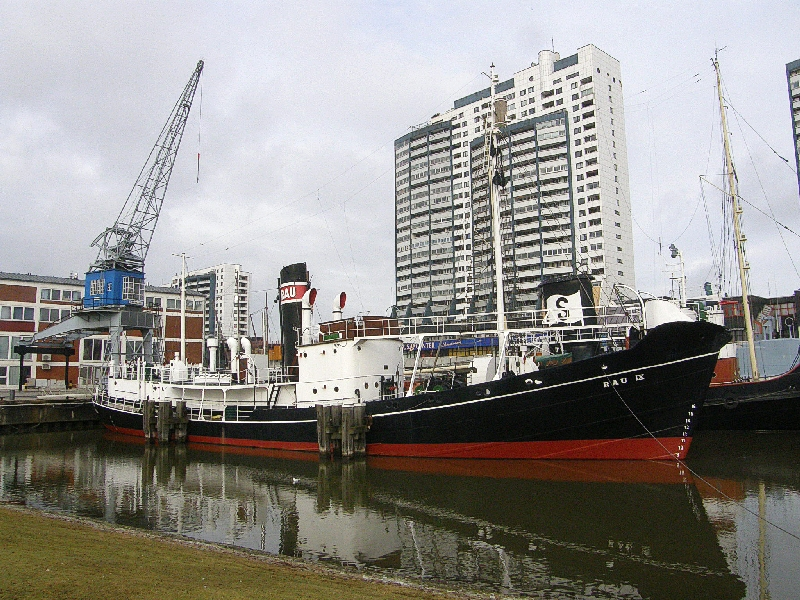 Bilder aus Bremerhaven German Shipping Museum Native nameDeutsches SchifffahrtsmuseumParent institutionLeibniz Association LocationHans-Scharoun-Platz 127568 Bremerhaven, BremenGermanyCoordinates53° 32′ 24.36″ N, 8° 34′ 37.2″ E Established5 September 1975Web pageDeutsches SchifffahrtsmuseumAuthority control : Q455354 VIAF: 128715457 ISNI: 0000 0001 2254 1113 LCCN: n50065866 NLA: 35745010 GND: 2008892-9 WorldCat institution QS:P195,Q455354